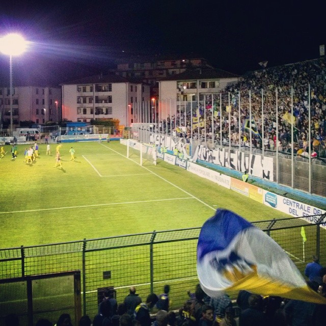 Frosinone-Salernitana playoff lega Pro